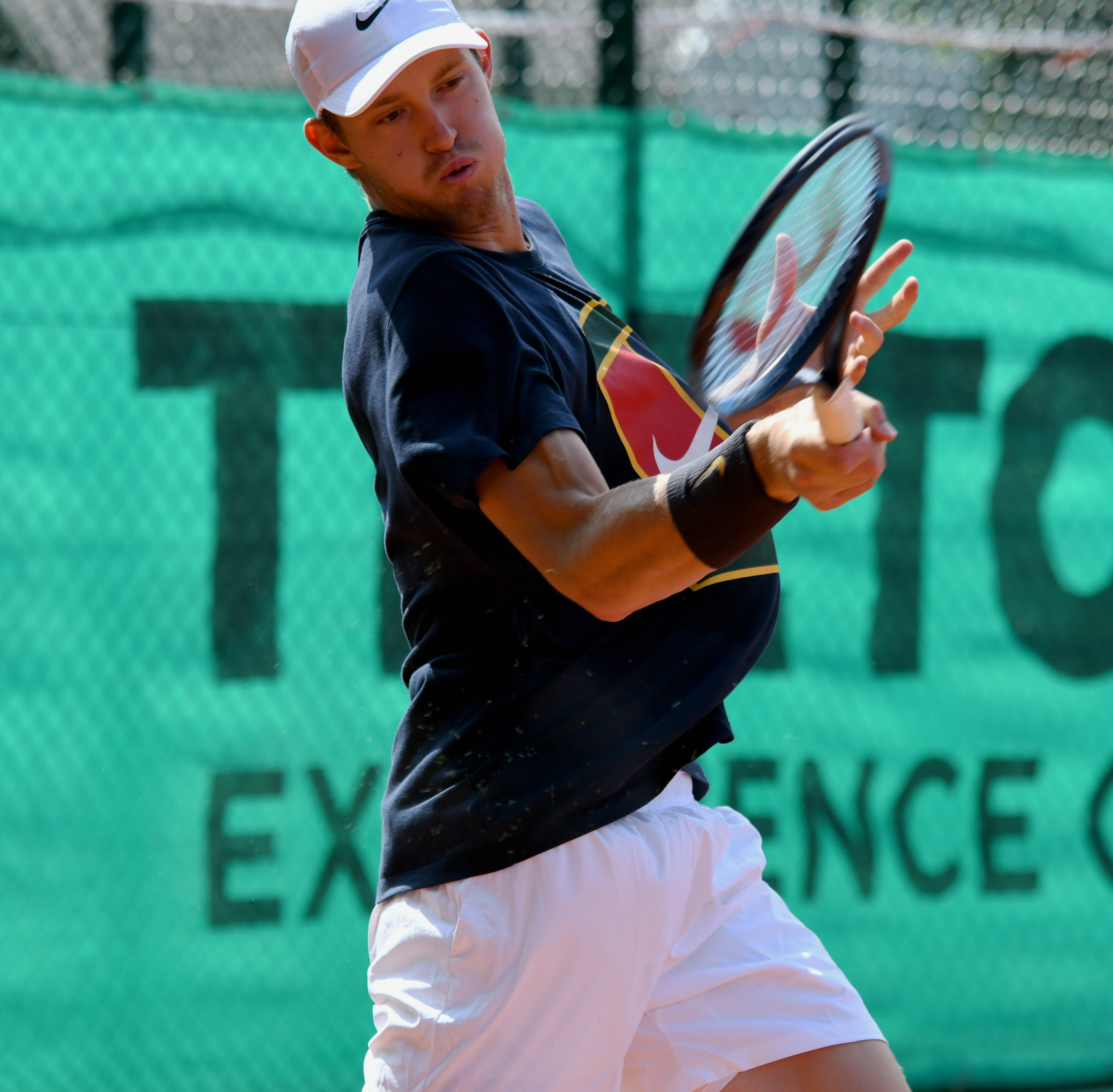 Nicolas Jarry, winner of ATP Båstad 2019.